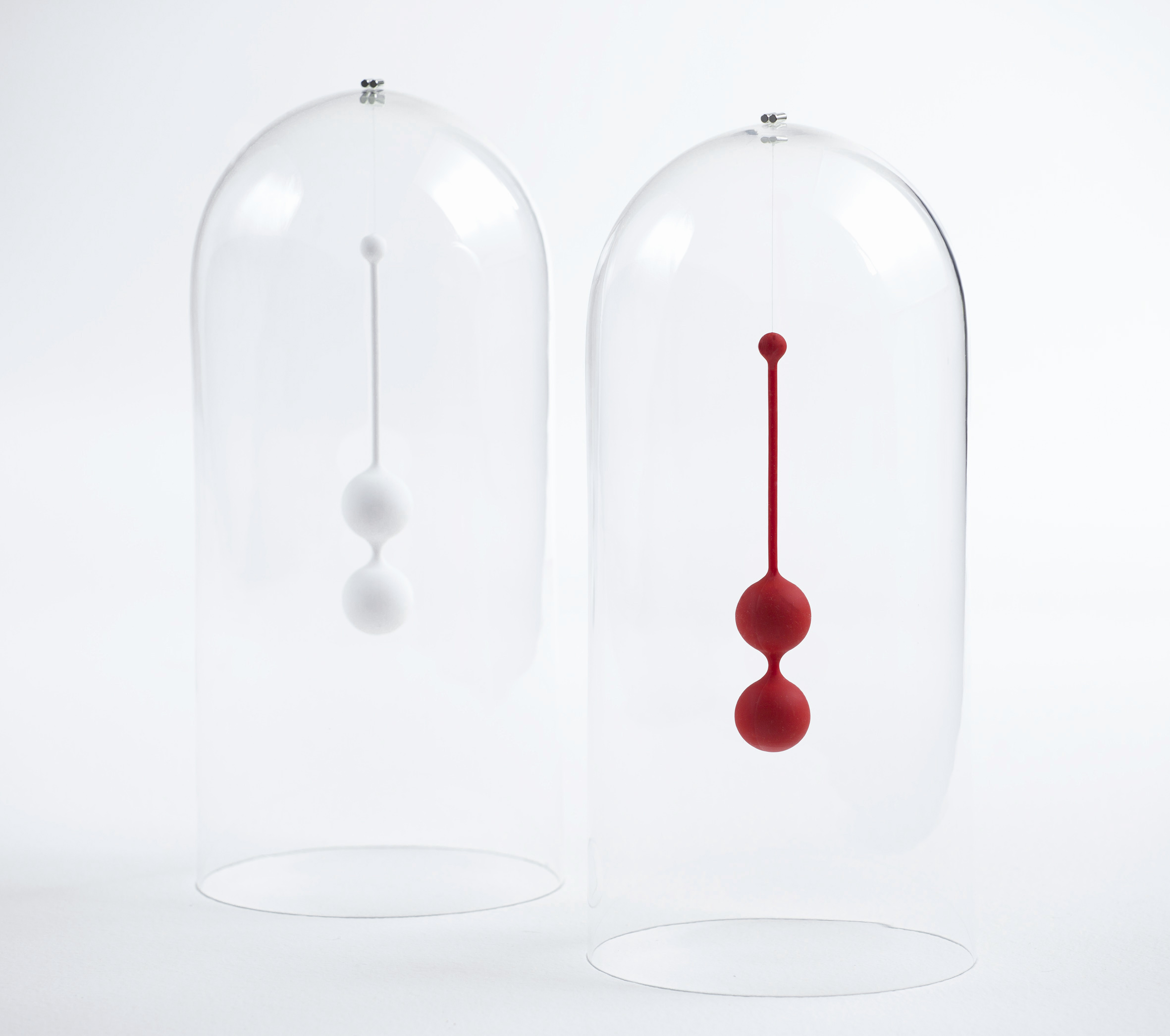 Venušiny Kuličky Whoop•de•doo by Jan Přibylský